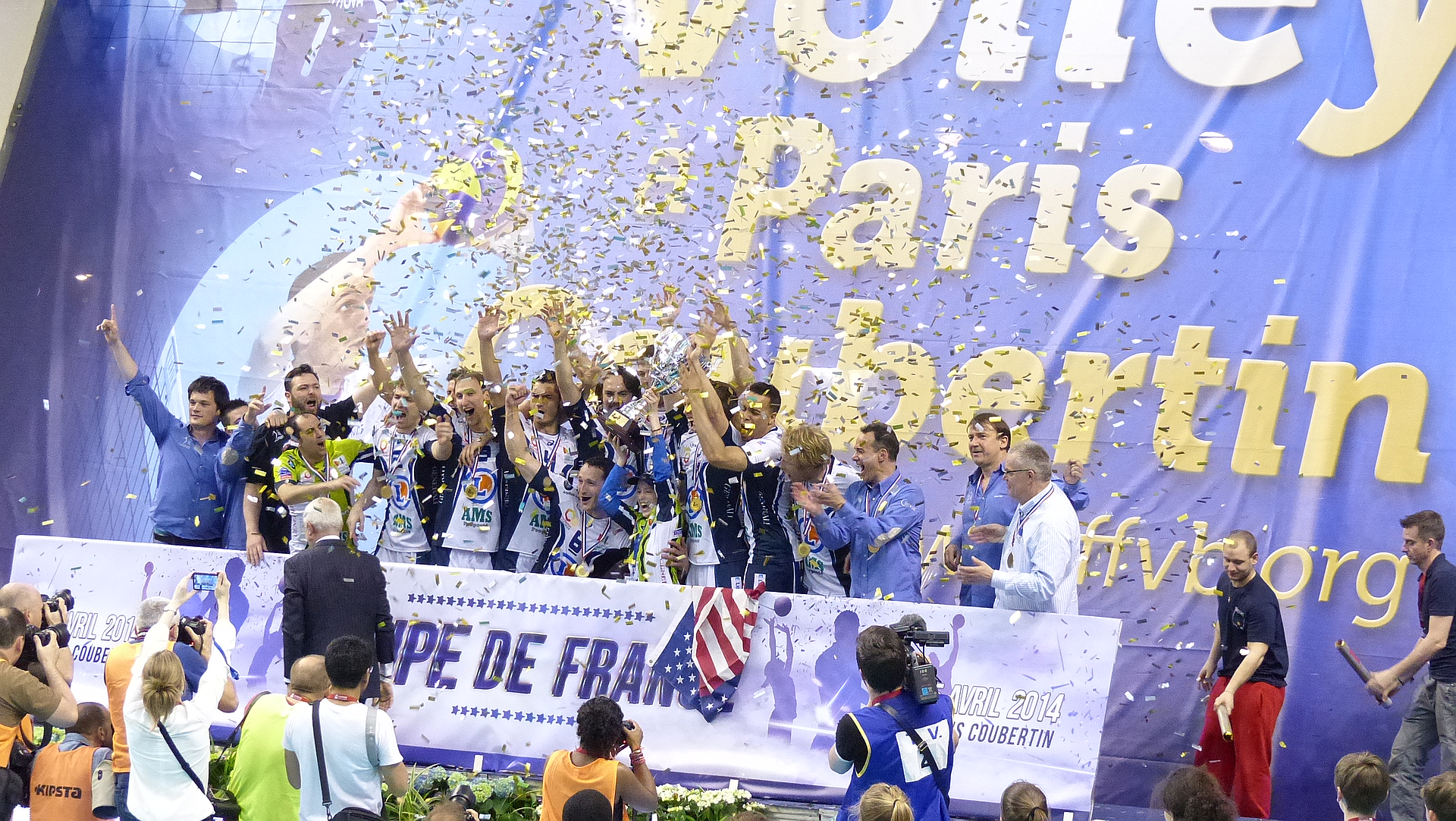 L'équipe du Tours Volley-Ball qui remporte la coupe de France 2013-2014 face au Paris Volley, au stade Pierre de Coubertin à Paris, le 05 avril 2014.